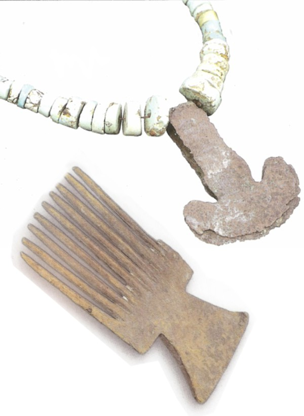 Collar de malaquita y peine de madera del cerro Chusca